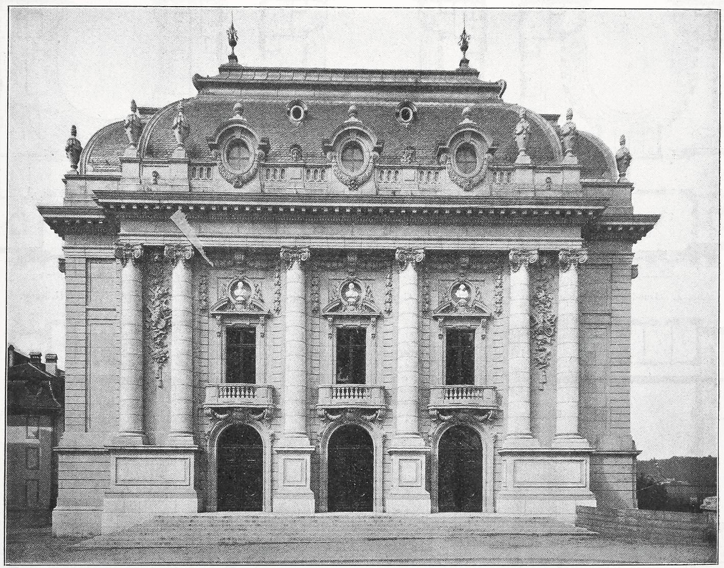 Die östliche Hauptfassade des neuen Theaters in Bern Abb 1 in der Schweizerischen Bauzeitung Bd 43/1904, S. 2